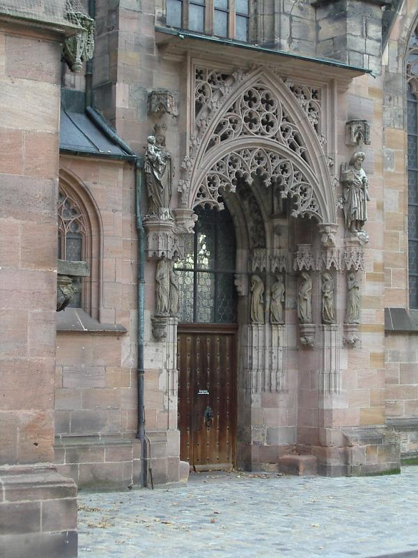 Nürnberg, St. Sebald, Brauttür am nördlich Seitenschff, von N0 (um 2003-11-07) - Maßwerk zuerst im 19. Jh. komplett erneuert.